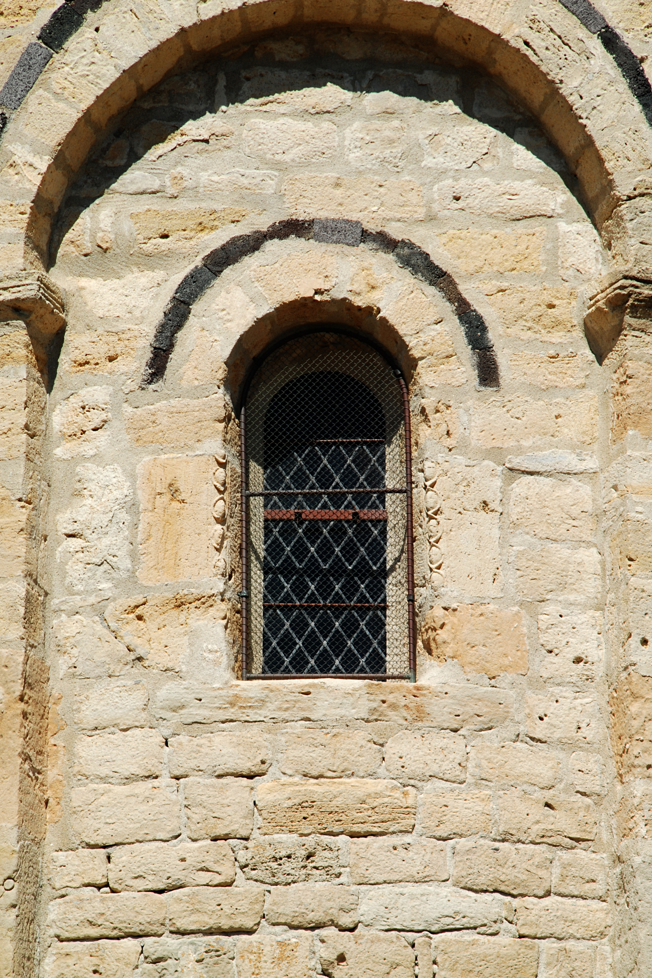 France - Languedoc - Aude - Église Saint-Jean l’Évangéliste d'Ouveillan .